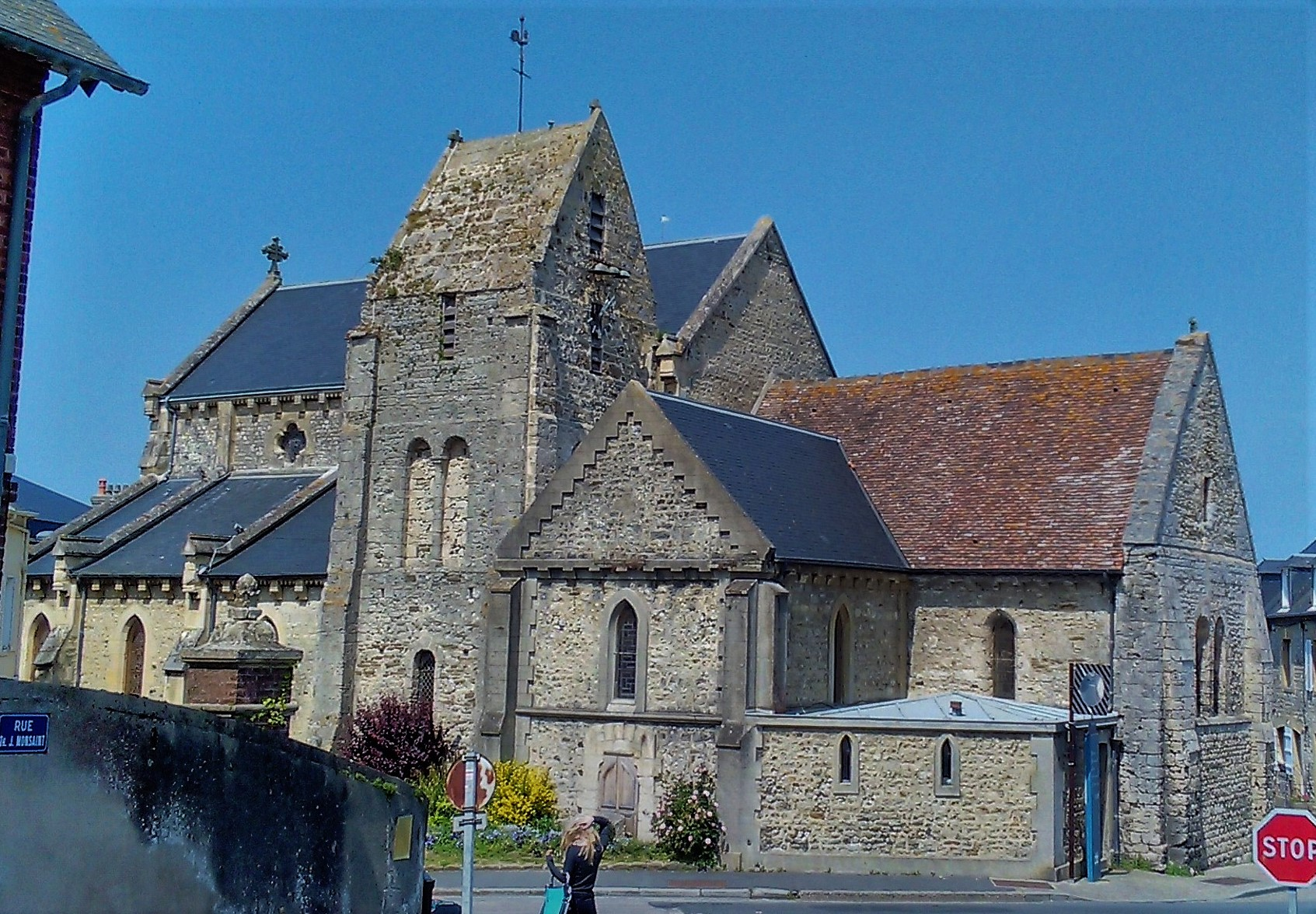 Tour de Villerville du 21 mai 2018. Église Notre-Dame de l'Assomption (XII° siècle, remaniée.